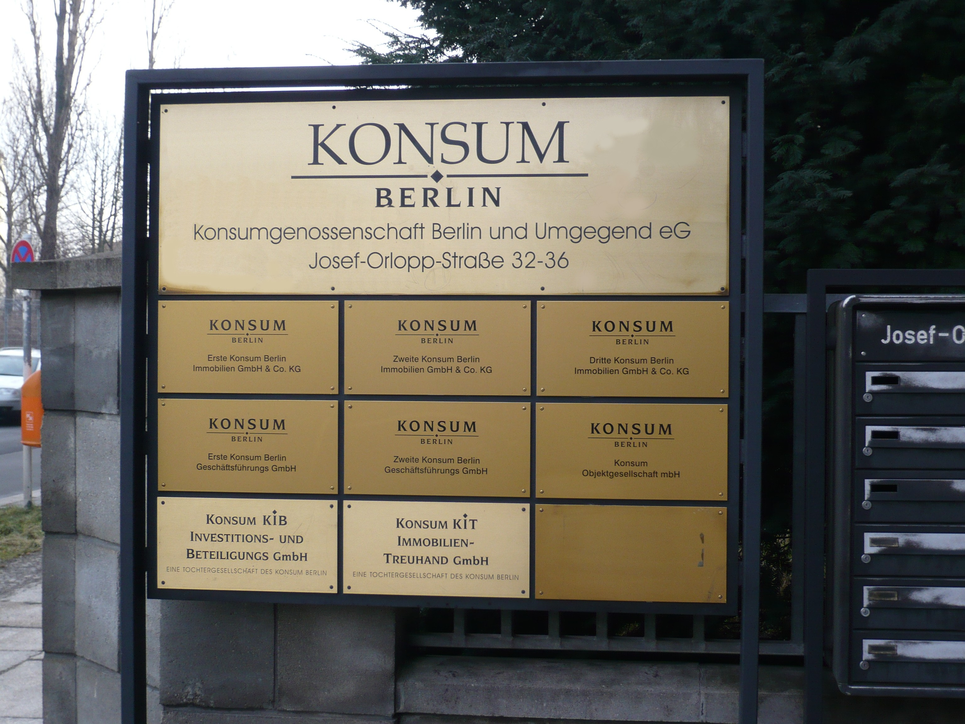 Berliner Konsumgenossenschaft und ihre 8 "Töchter", februar 2009